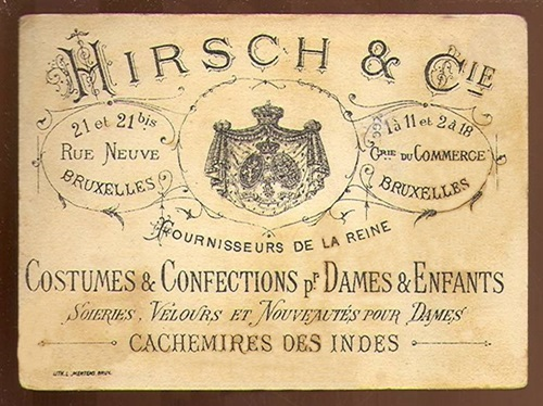 Anzeige Hiersch & Cie Brüssel